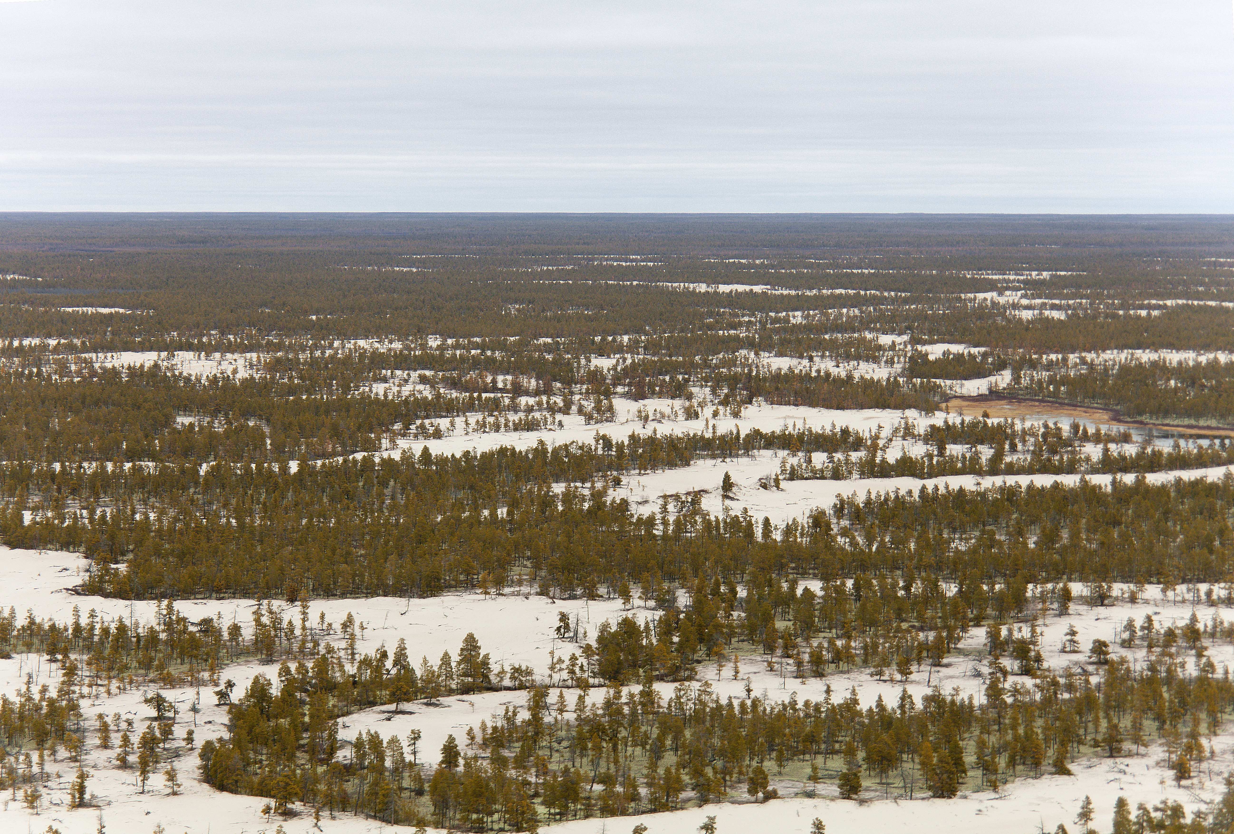 Sakha (Yakutia). Tukulans (sand dunes)